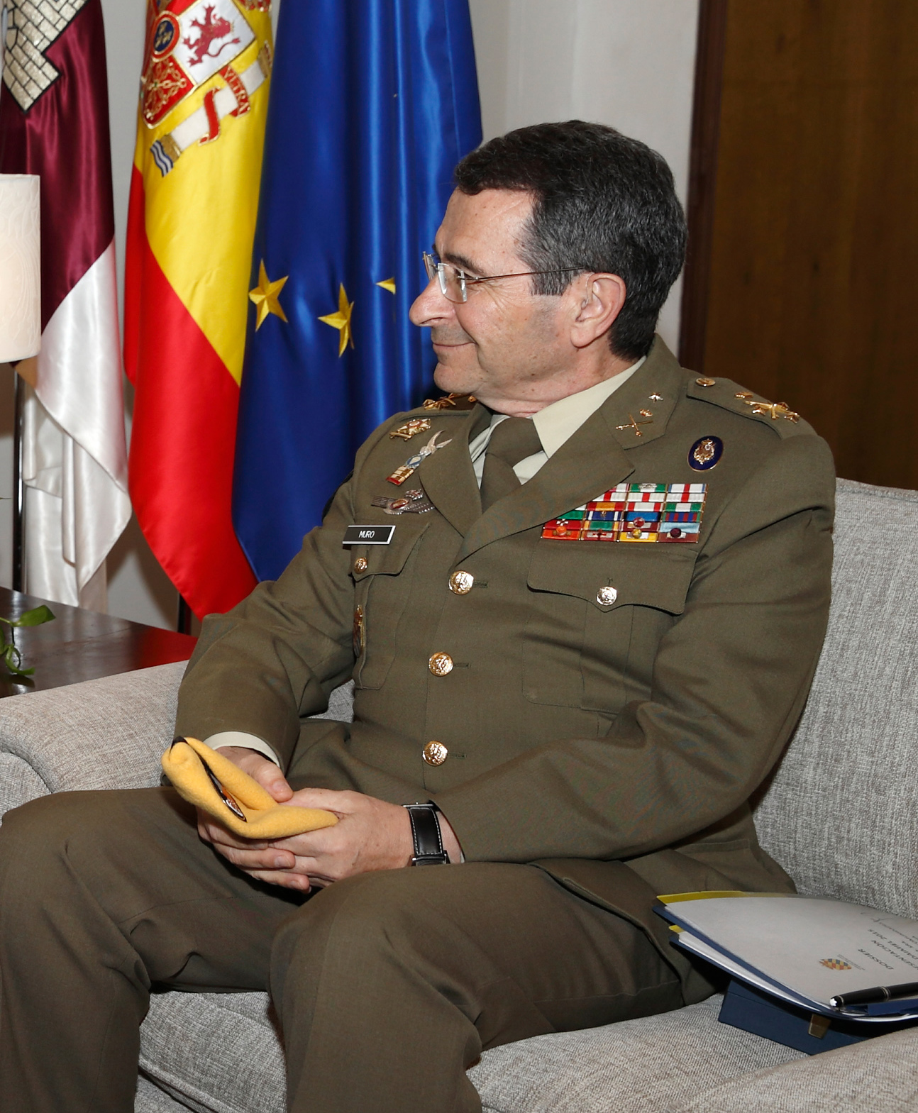 El teniente coronel César Muro Benayas en una recepción por parte de la presidenta de Castilla-La Mancha